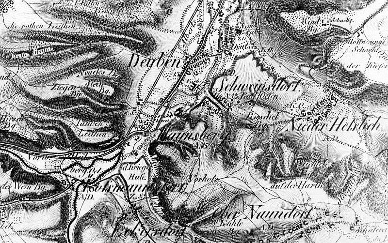 Original image description from the Deutsche Fotothek Freital- Deuben. Oberreit, Sect. Dresden, 1821/22